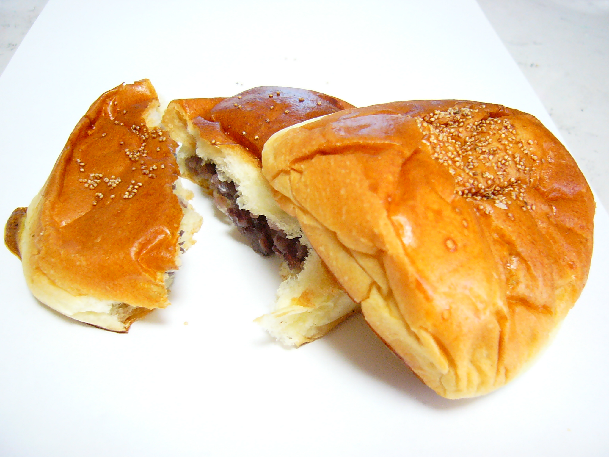 Anpan, Japanese sweet bread